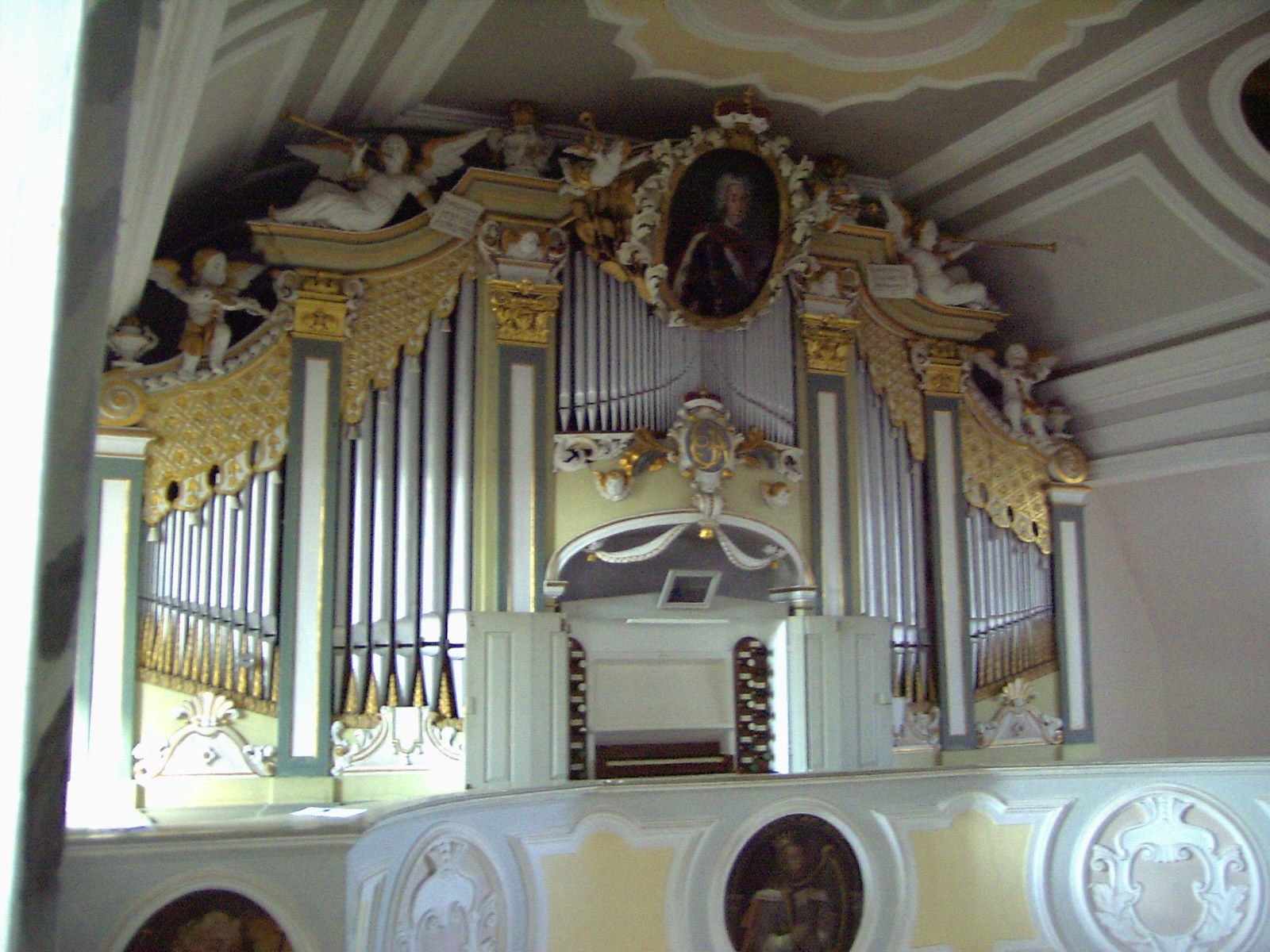 Niederroßla